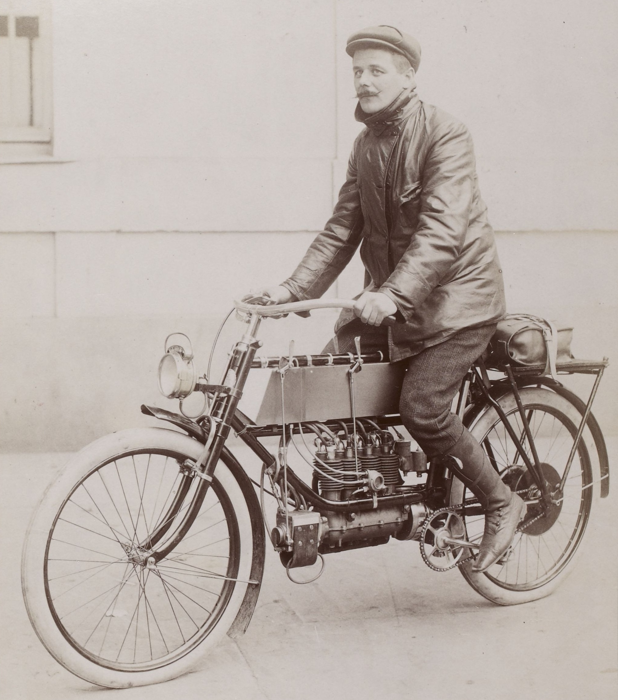 [Collection Jules Beau. Photographie sportive] : T. 28. Année 1904 / Jules Beau : F. 36v. Circuit européen d'Osmont, 16 novembre 1904